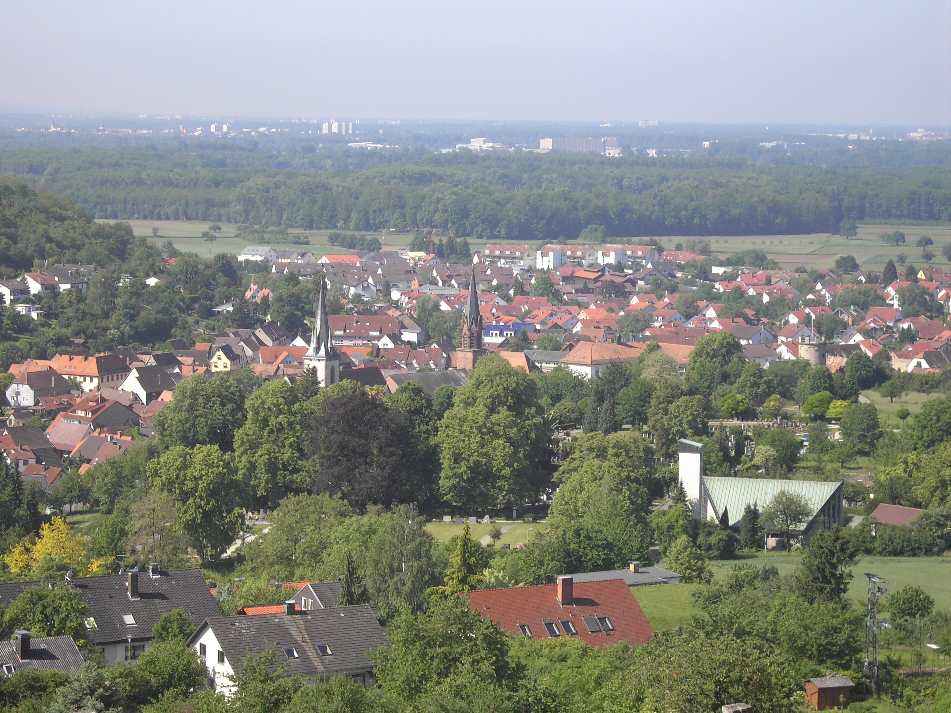 Weingarten (Baden), Germany